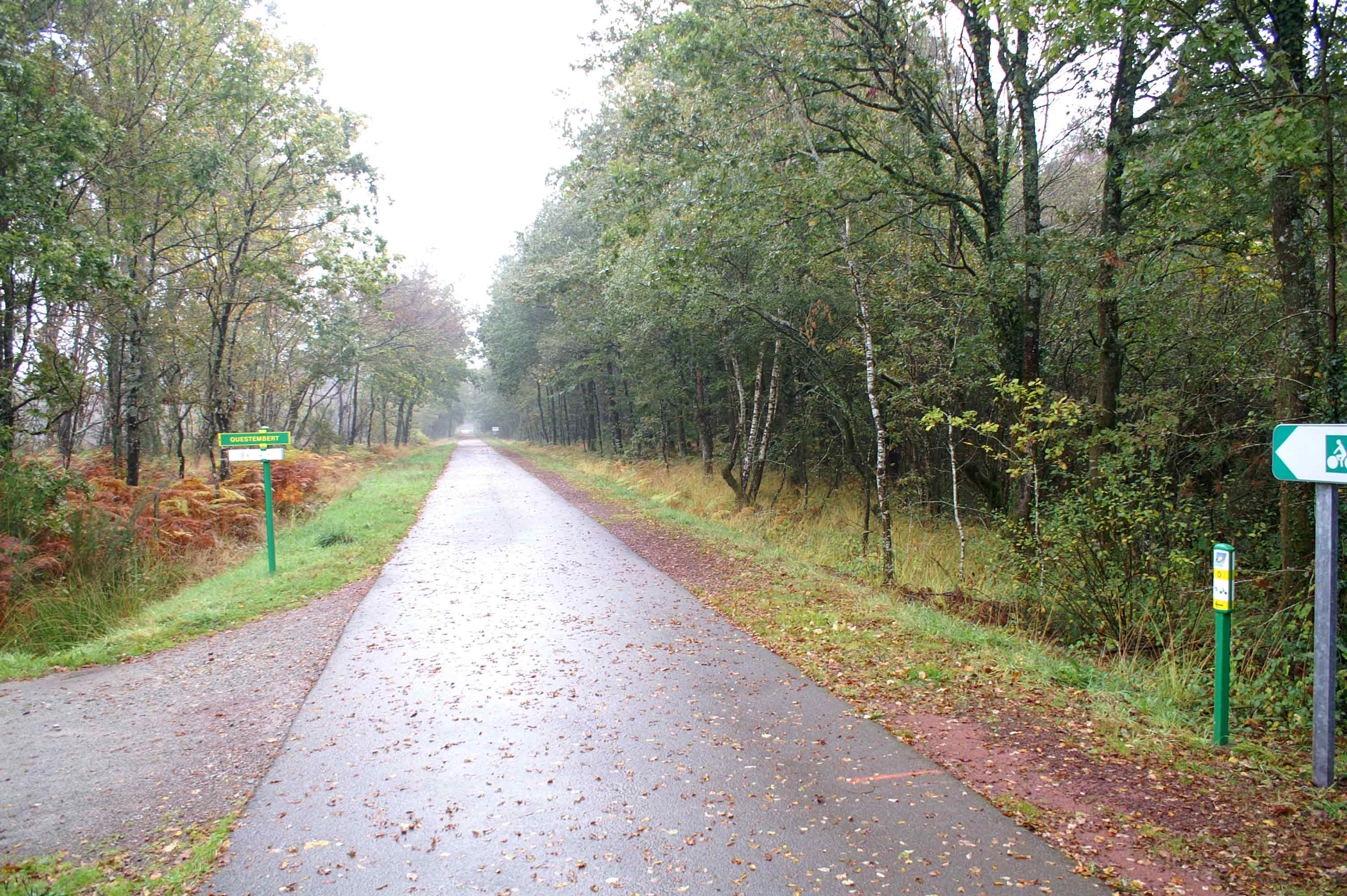 A Questembert, au lieu dit Bel-Air, le km 0 de la voie verte réalisée sur la plateforme de la ligne de chemin de fer Questembert - Ploërmel. Point actuellement situé à quelques centaines de mètres de l'ancien embranchement et de la gare ferroviaire de Questembert.